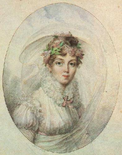 Портрет княгини З.А.Волконской. Всероссийский Музей им. А.С. Пушкина, Спб.